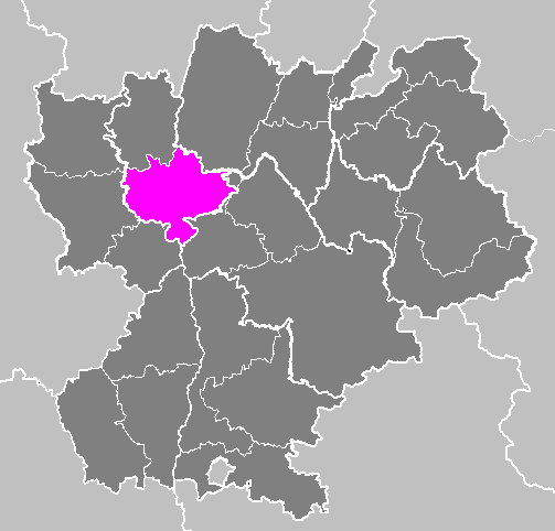 Maps of arrondissements and cantons of France: Arrondissement de Lyon.PNG (Région Rhône-Alpes)